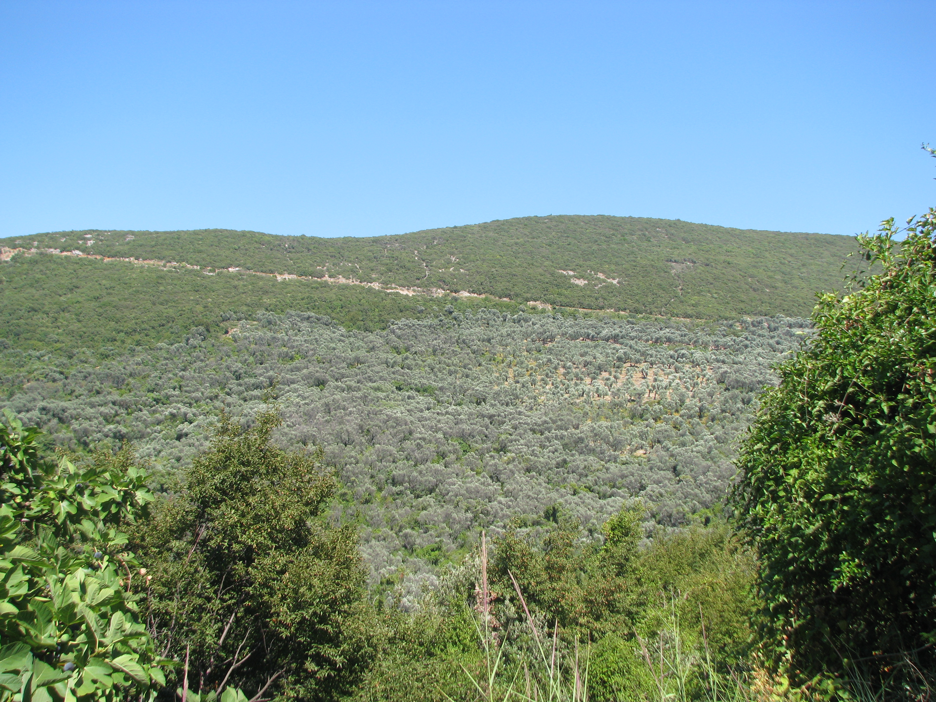 Valdanos, maslinjak, 2011/08/13